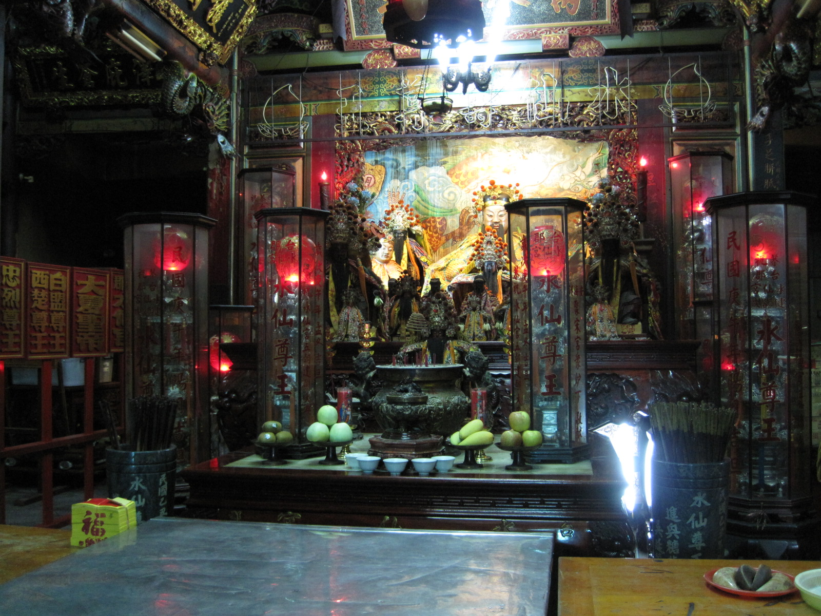 臺南水仙宮內部